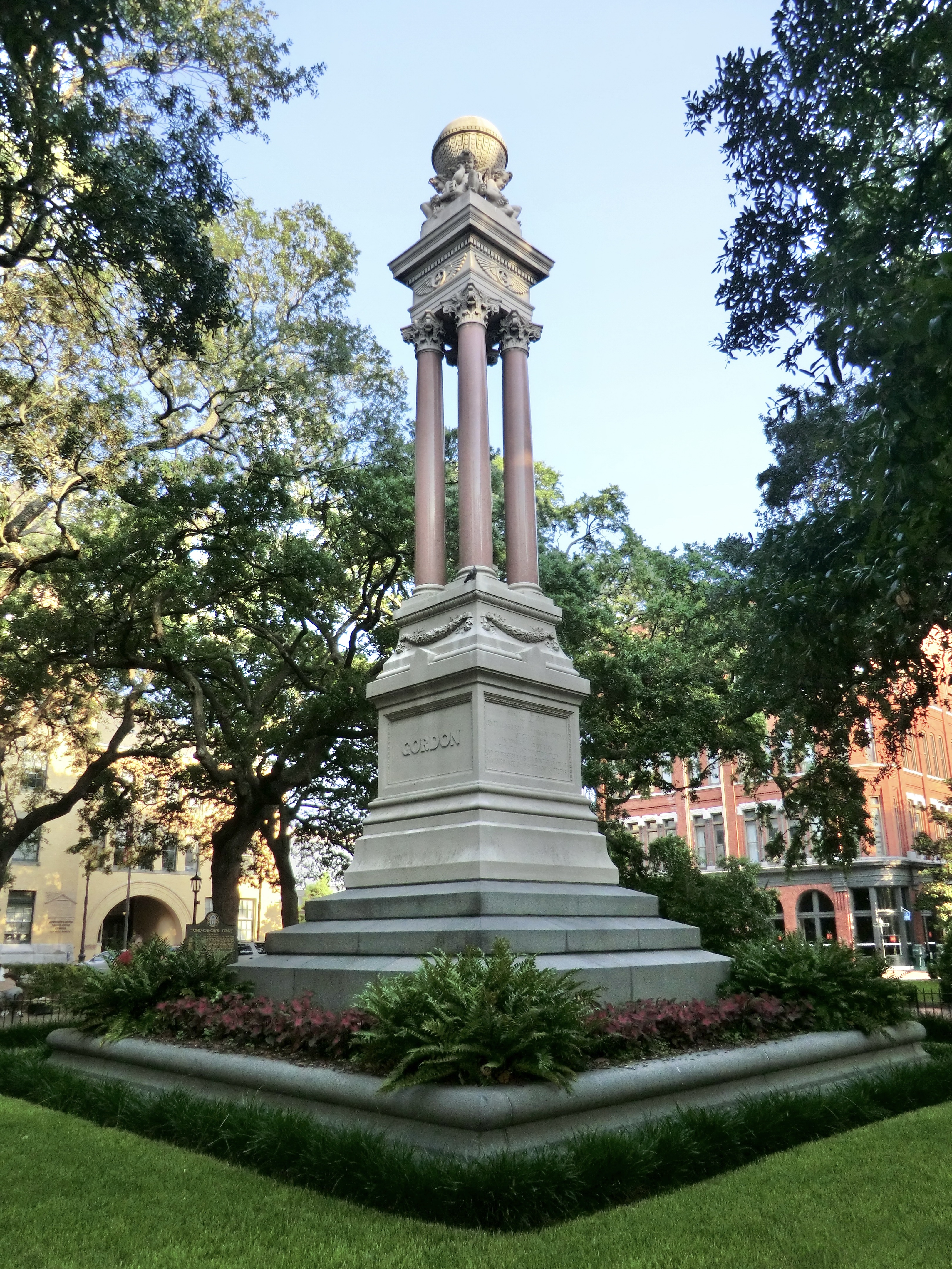 Monument